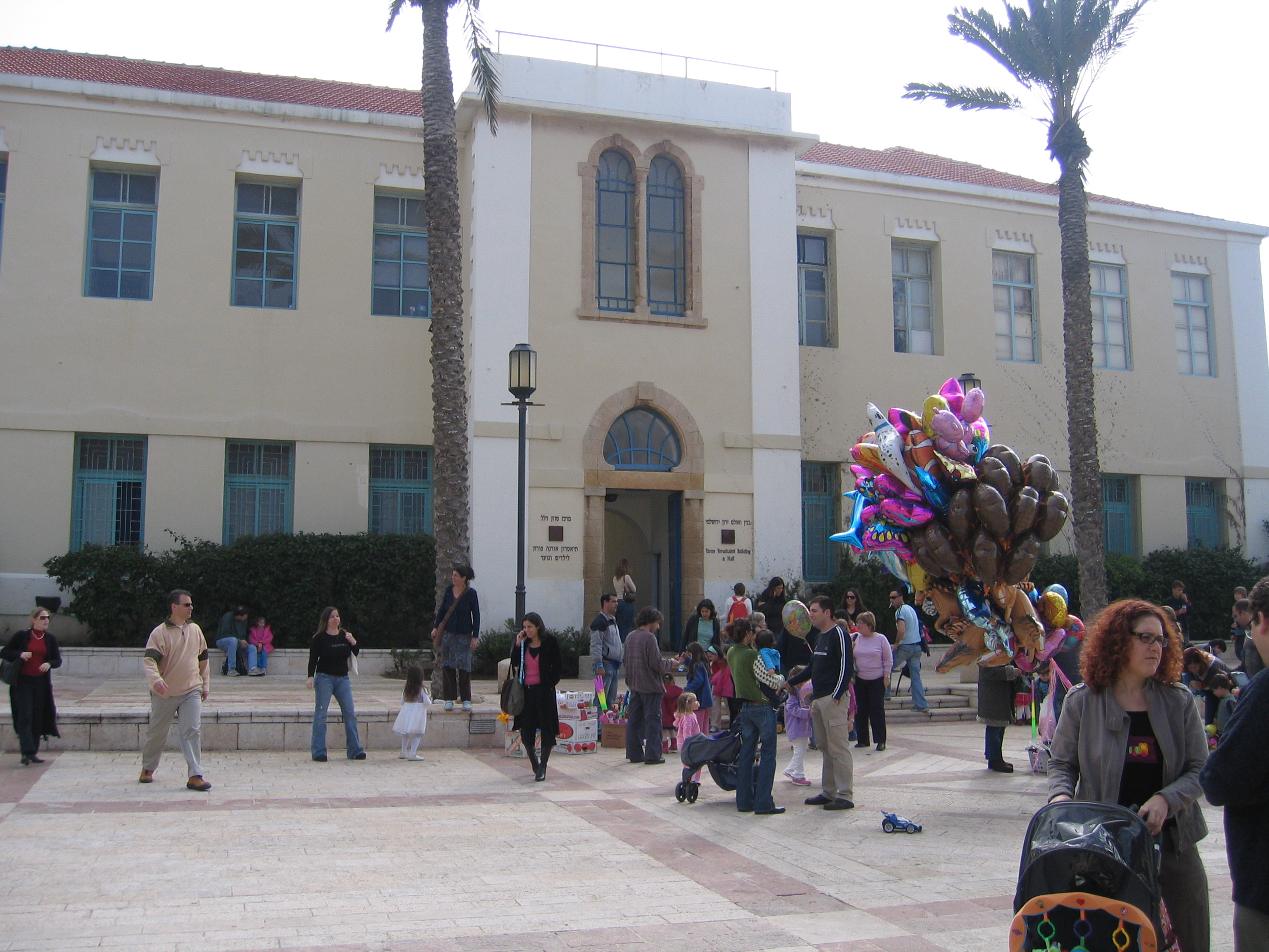 Talmoryair 13:24, 28 January 2007 (UTC)